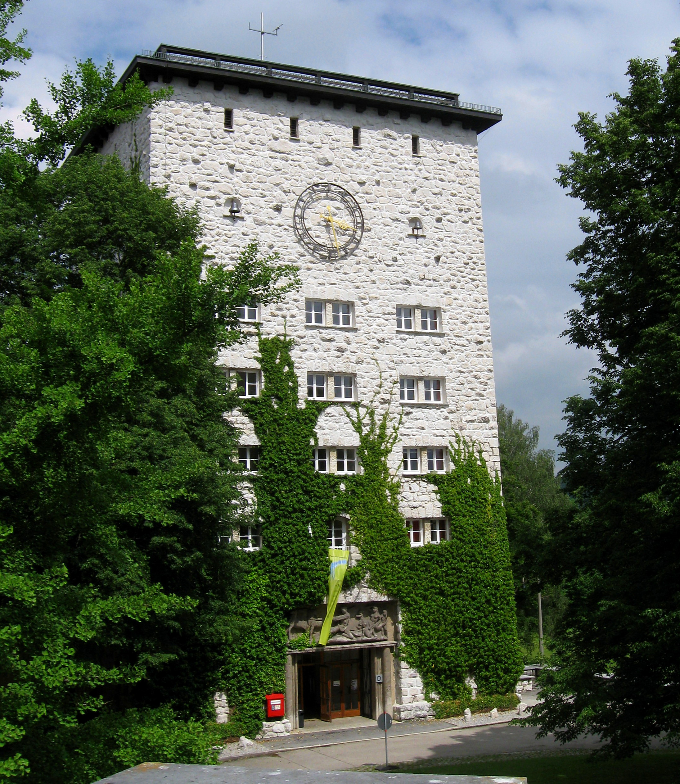 "Finanzschule" Herrsching - Wasserturm im Osten der Anlage